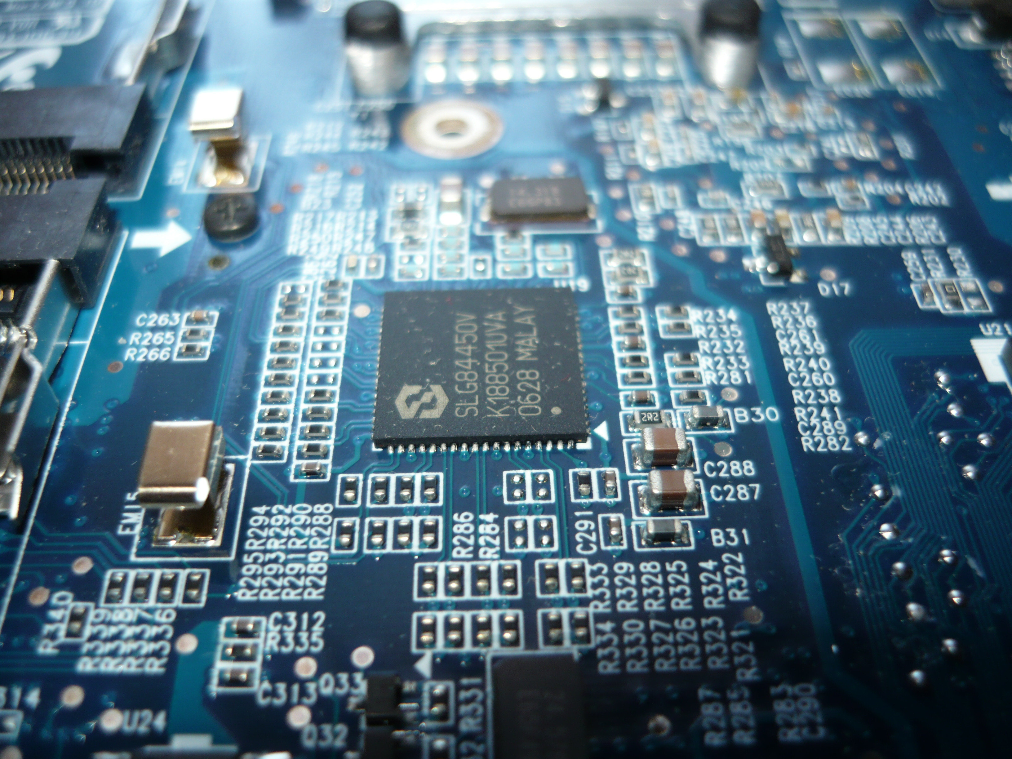 Клокер Silego